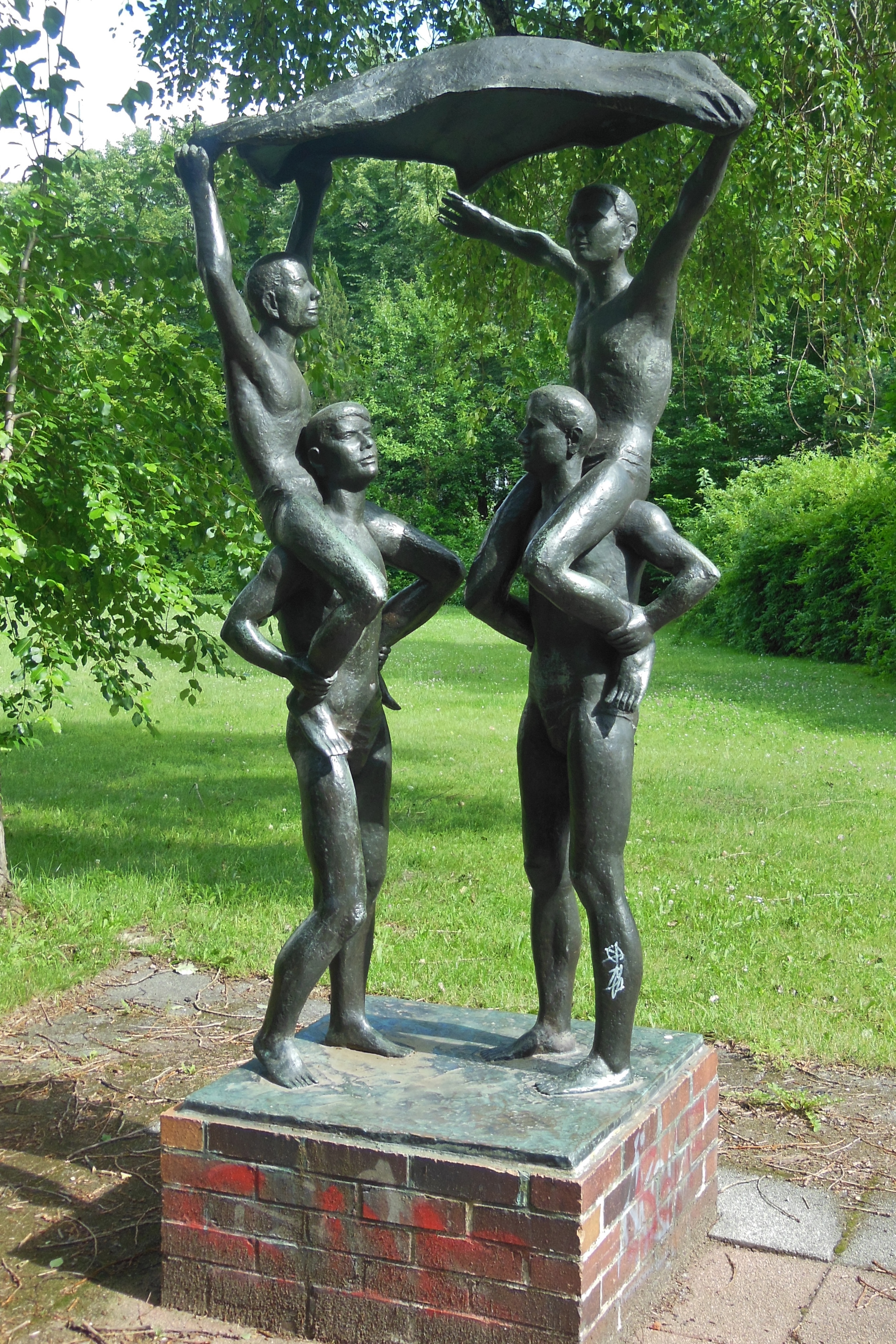 Plastik „Huckepack-Jungen“ am Raumflugplanetarium